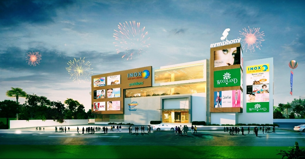 symphony mall